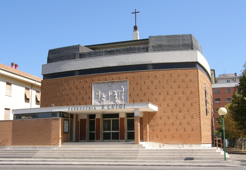 Pescara